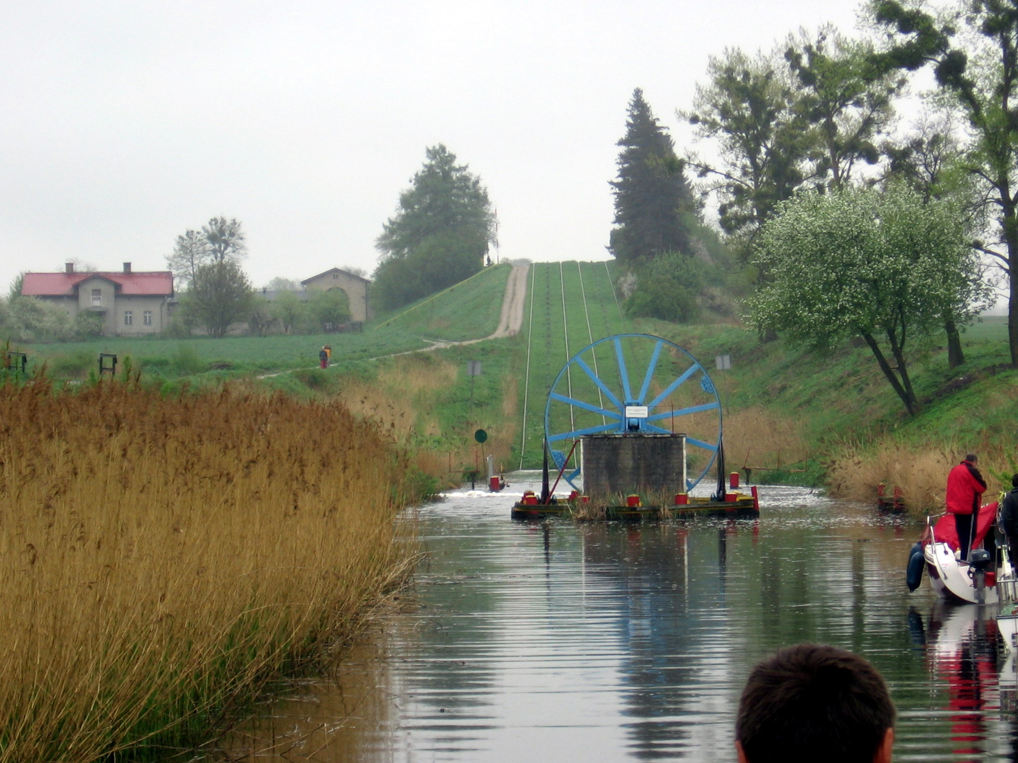 Pochylnia Jelenie w zespole Kanału Elbląskiego